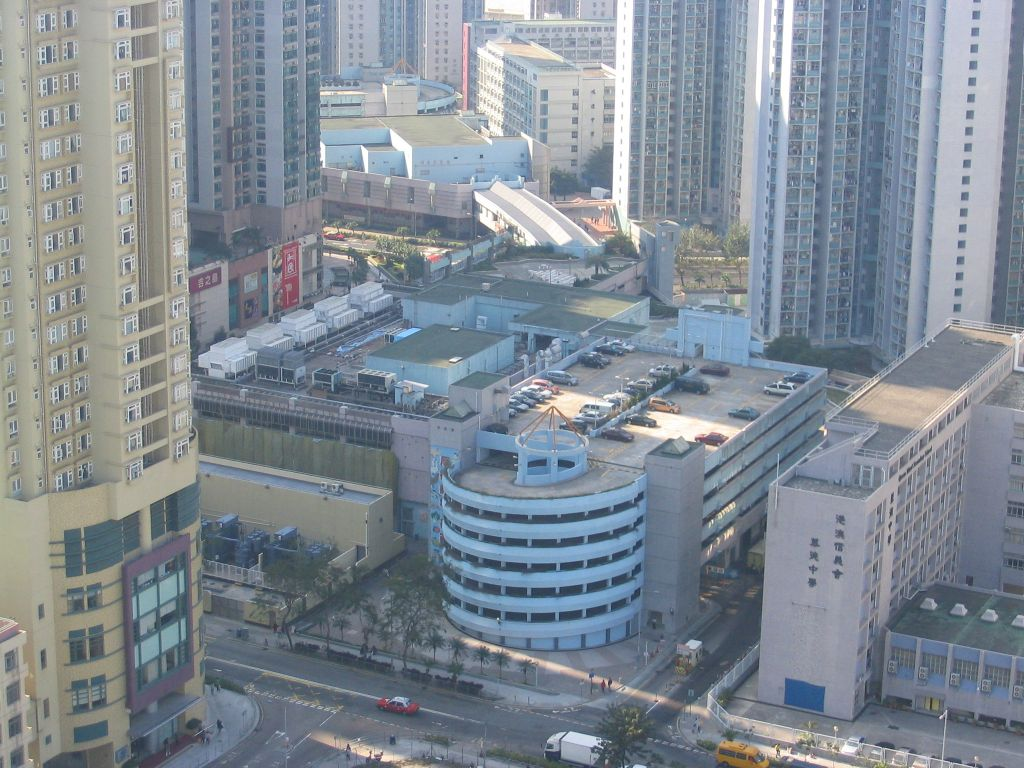 坑口-厚德商場 Hau Tak Shopping Centre, Hang Hou